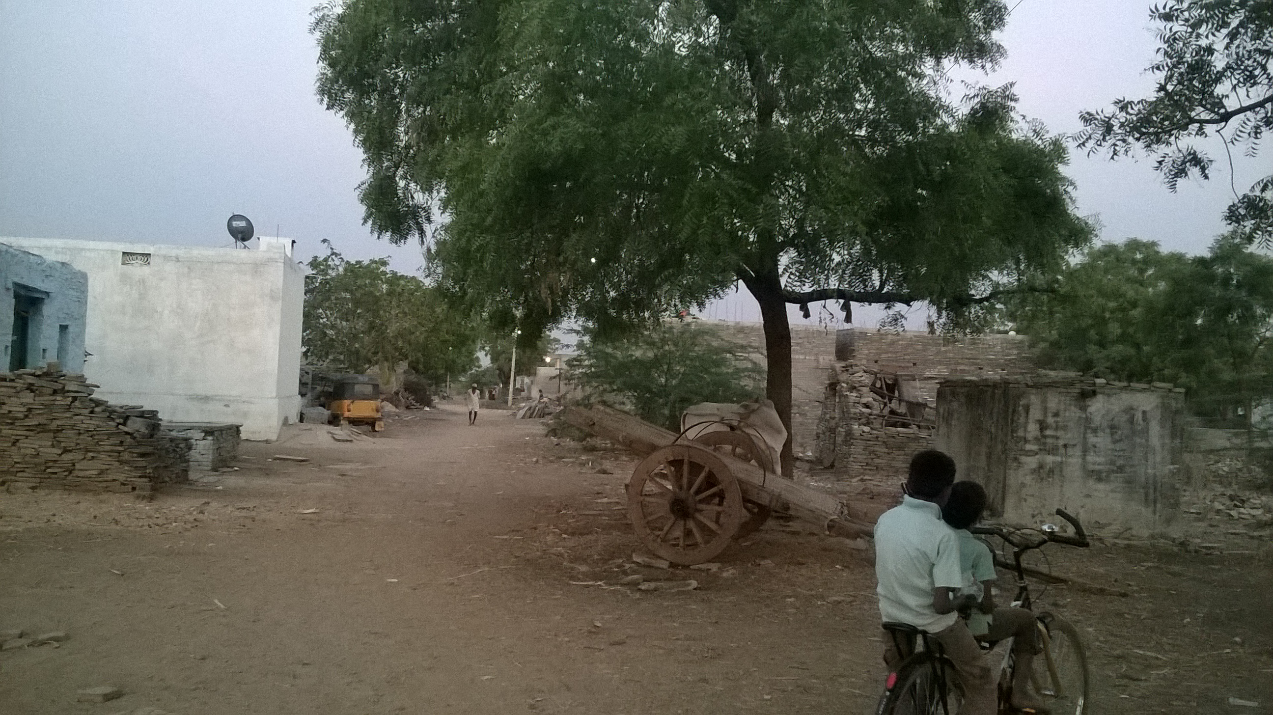 శేరిపల్లి